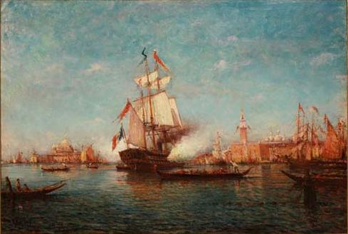 Tableau "Le Canon à Venise" huile sur toile, 98 × 146 cm, œuvre du peintre Charles Malfroy (fr:1862-fr:1918) Ce tableau représente l'entrée du Grand Canal à Venise un jour de fête ; le bateau du premier plan tire au canon pour annoncer le début des festivités. Photographie créée à partir d'une autre photographie et retravaillée par Semnoz